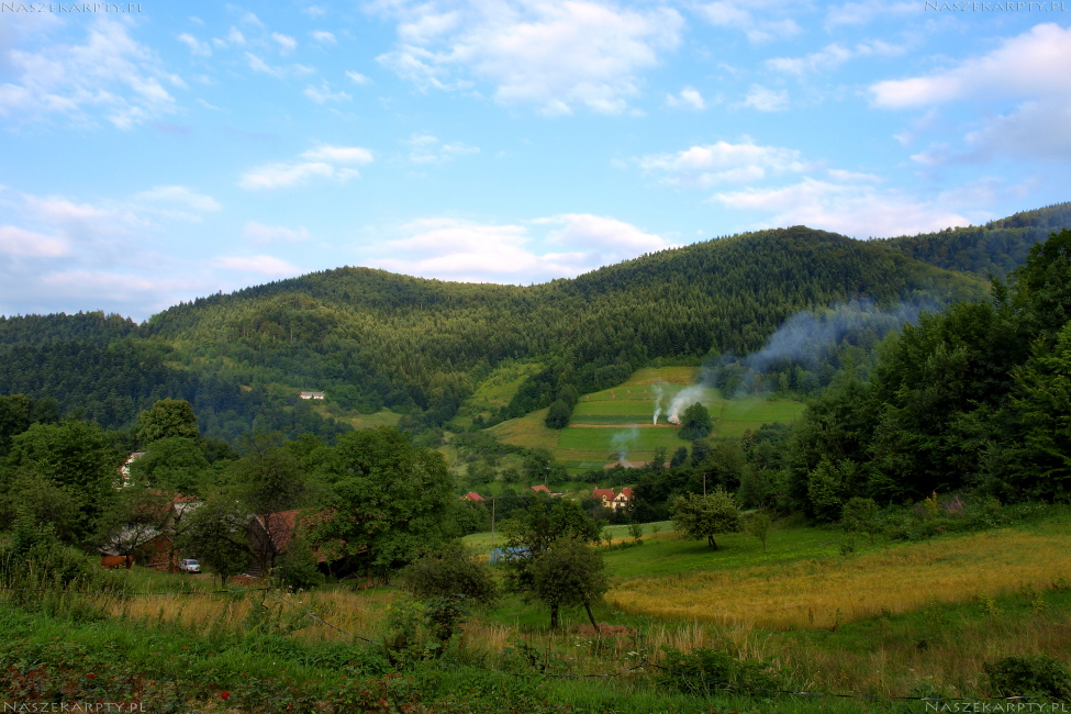 Przysiółek "Zastyrem" w Jaworznej